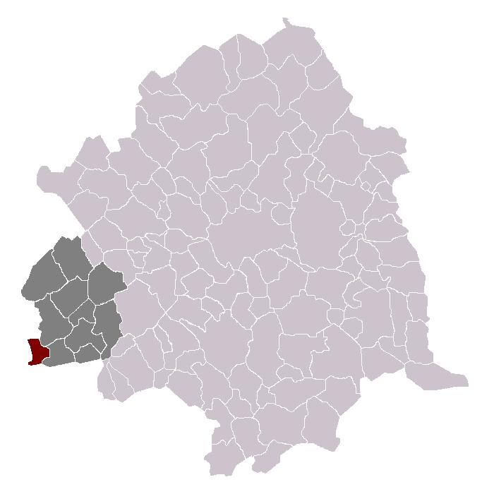 La Bassée dans son canton et son arrondissement